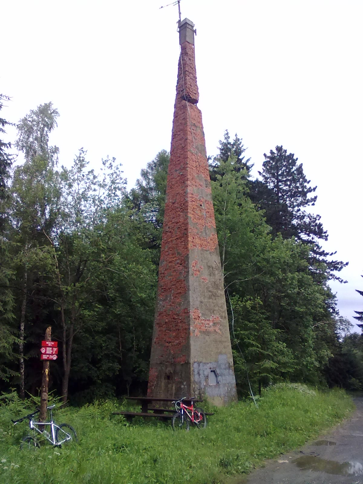 Biciklom/Strmac-Brezovo Polje